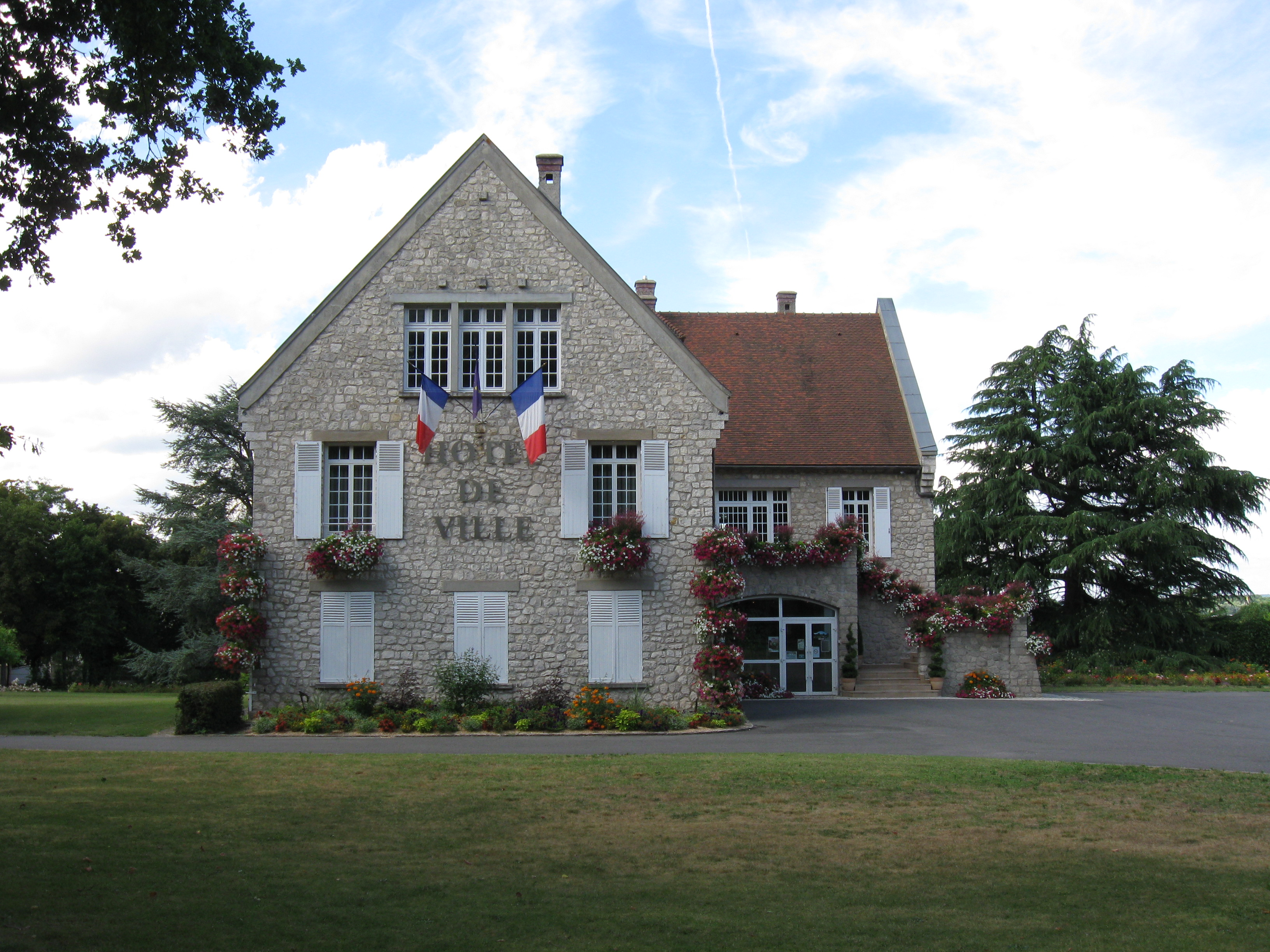 Mairie de Saint-Pierre-lès-Nemours (Seine-et-Marne, région Île-de-France)